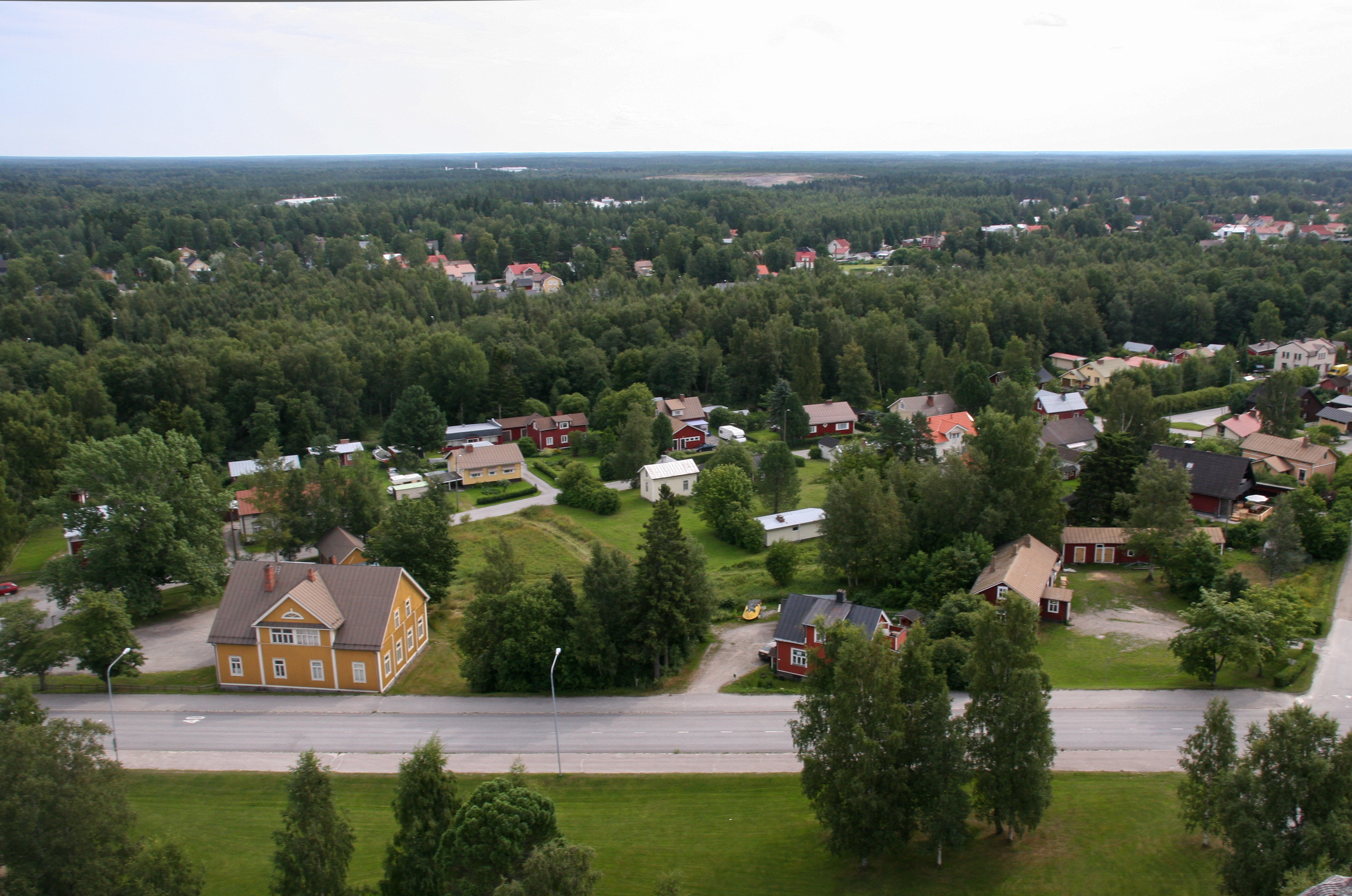 Pedersören kirkko ja Kirkkoranta; rakennettu kulttuuriympäristö Pietarsaaressa. Kuvattu kirkon tornista.